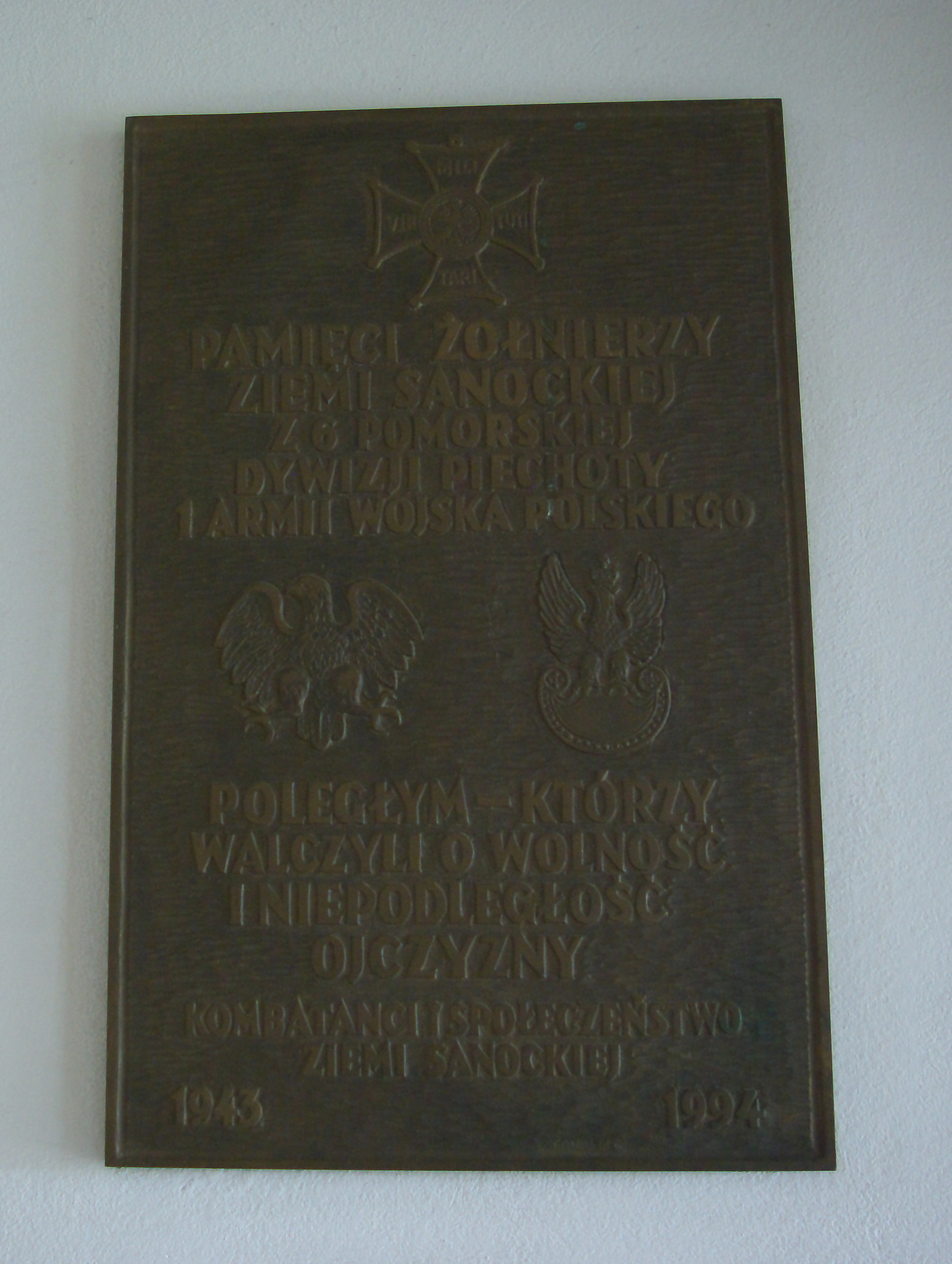 Kościół Chrystusa Króla w Sanoku. Tablica upamiętniająca żołnierzy 6 Pomorskiej Dywizji Piechoty 1 Armii Ludowego Wojska Polskiego.